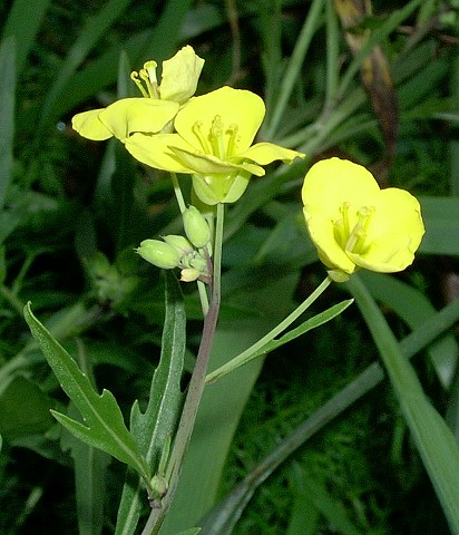 Brassica rapa